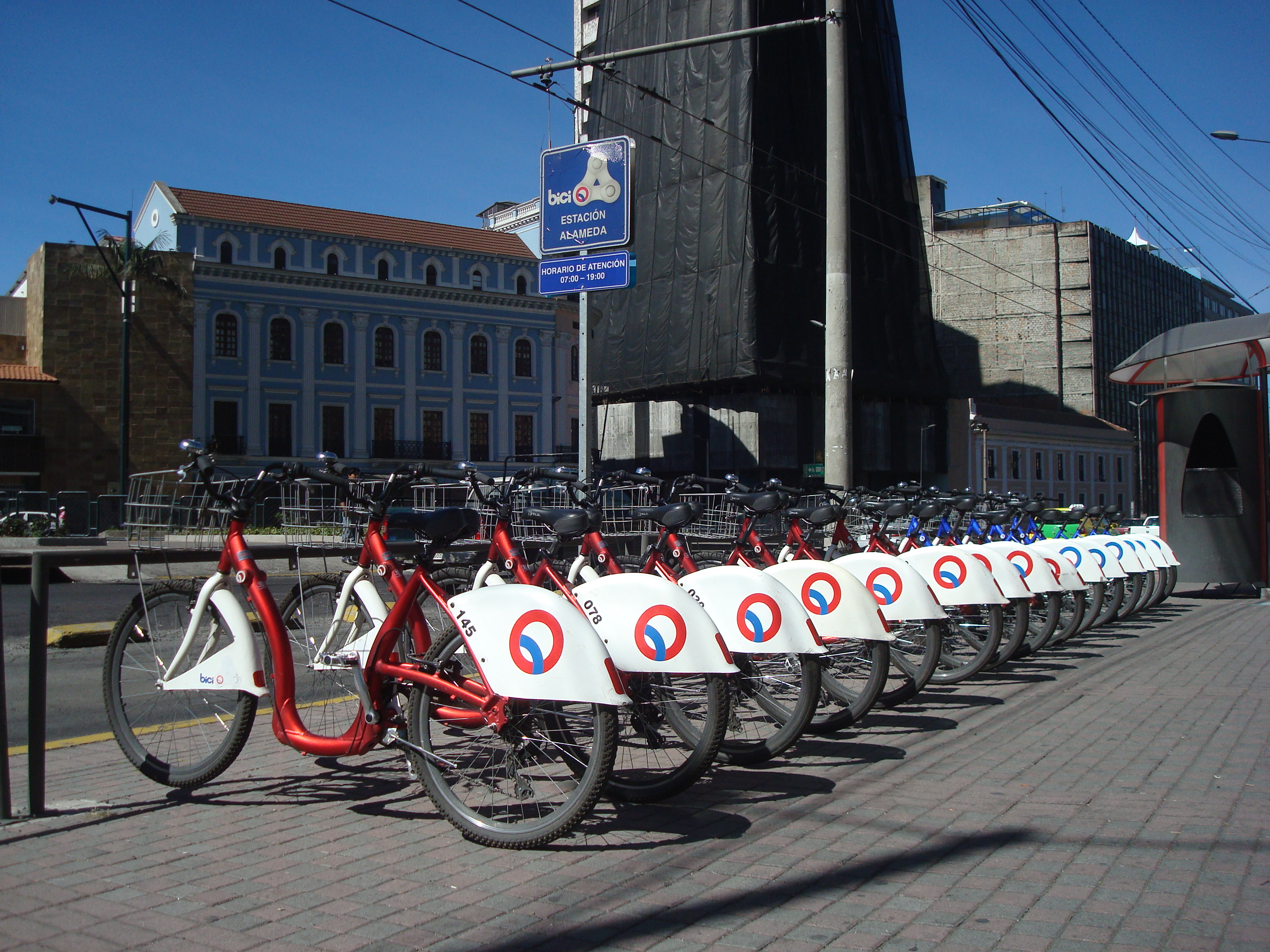 Servicio de transporte en bicicleta en las zonas de mas afluencia en Quito